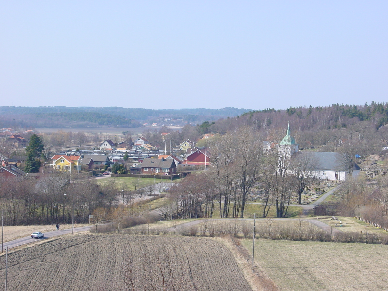 Säve Kyrkby